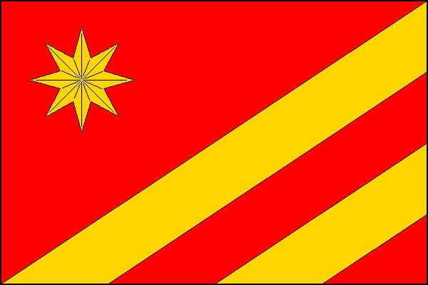 Vlajka obce Dvorce (okres Bruntál)